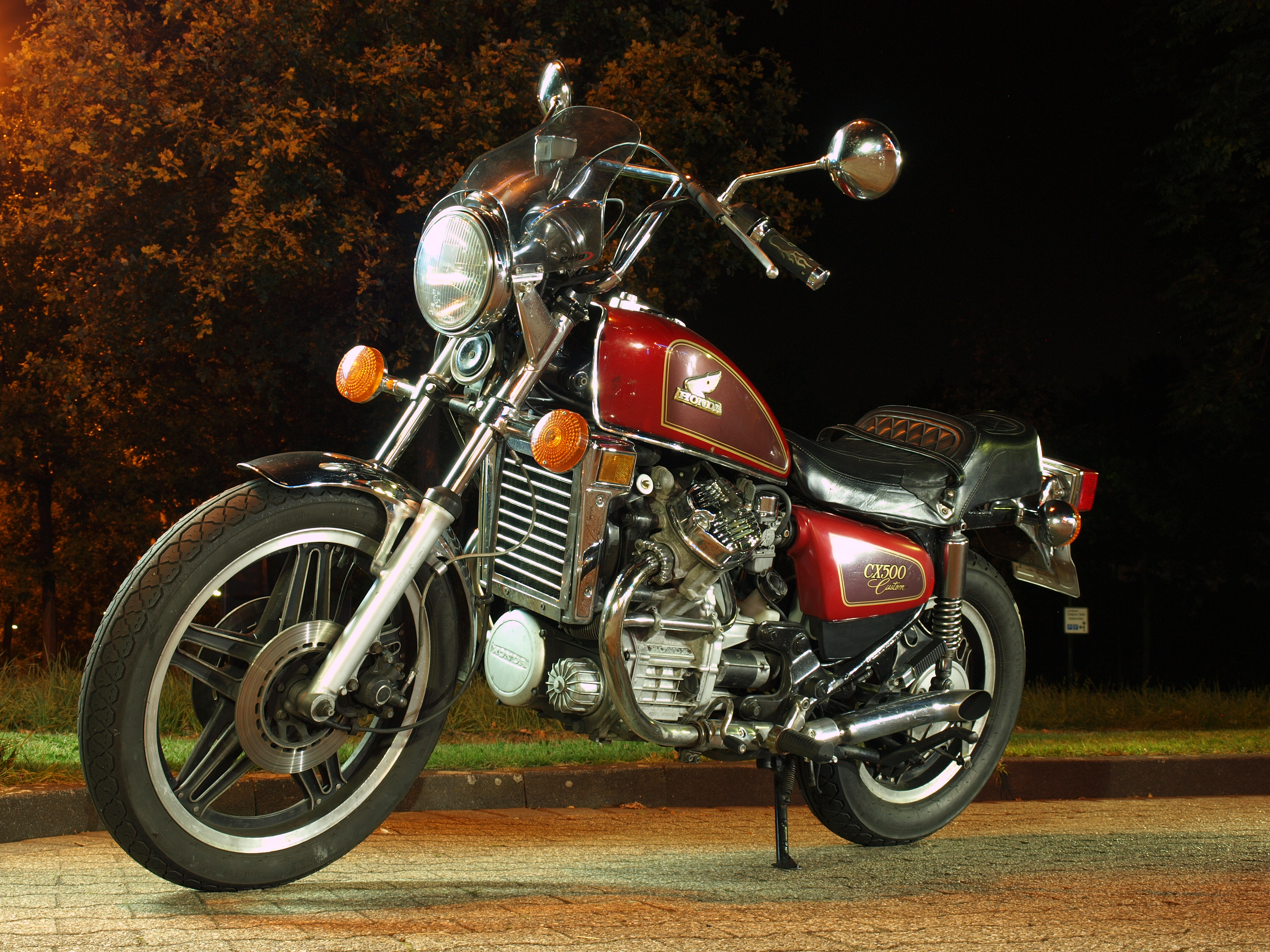 HONDA CX 500 C "Güllepumpe"